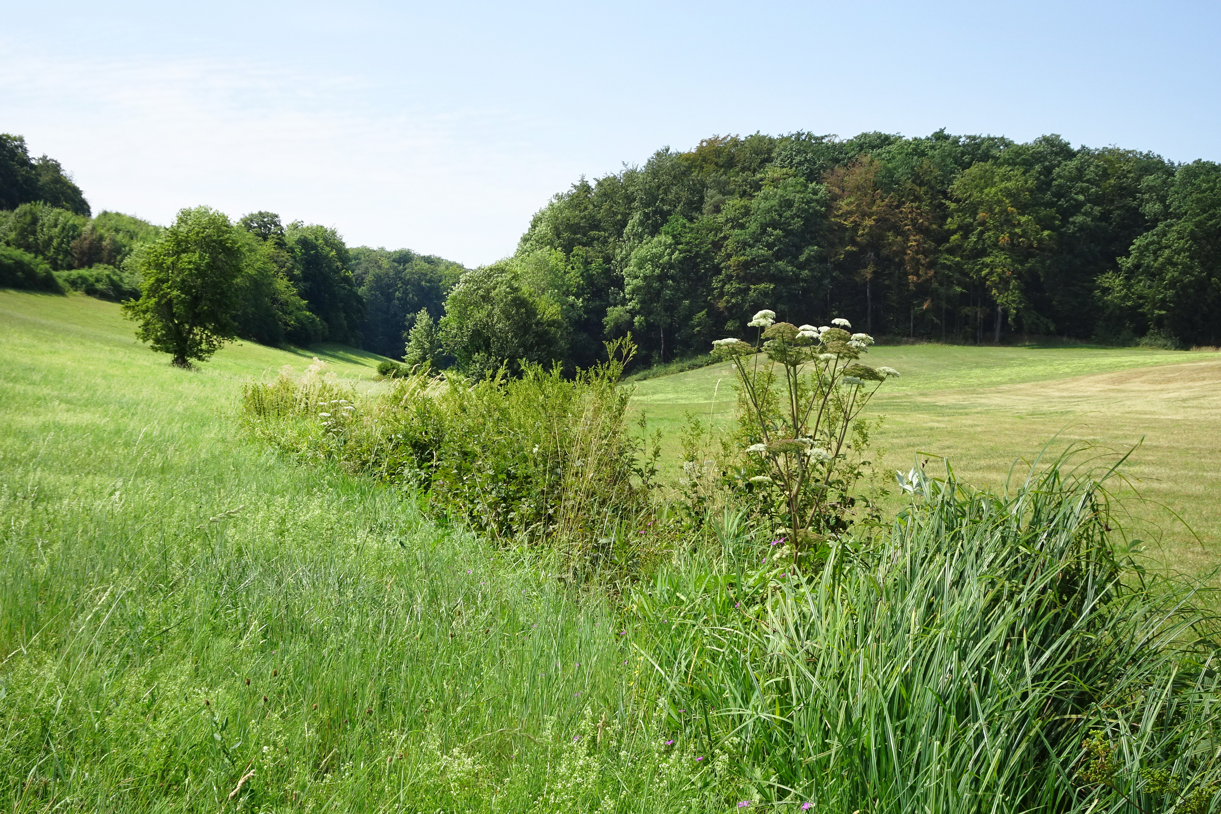 Der „Wald südöstlich von Netra“ liegt im nördlichen Hessen, in der Nähe der Landesgrenze zu Thüringen. Administrativ gehören die Flächen zu den Gemarkungen der Ortsteile Netra, Rittmannshausen und Lüderbach der Gemeinde Ringgau im nordhessischen Werra-Meißner-Kreis. Der sich in einer Talung des Muschelkalk-Plateaus des Ringgaus befindende Bereich wird durch ein Mosaik verschiedener Waldgesellschaften und von Kalk-Halbtrockenrasen geprägt. Wegen dem Vorkommen von Lebensräumen sowie Tier- und Pflanzenarten, die nach der im Jahr 1992 von den Mitgliedstaaten der Europäischen Union beschlossenen Flora-Fauna-Habitat-Richtlinie als von gemeinschaftlicher Bedeutung gelten, wurde der Bereich zu einem Bestandteil des europaweiten Schutzgebietssystems Natura 2000.